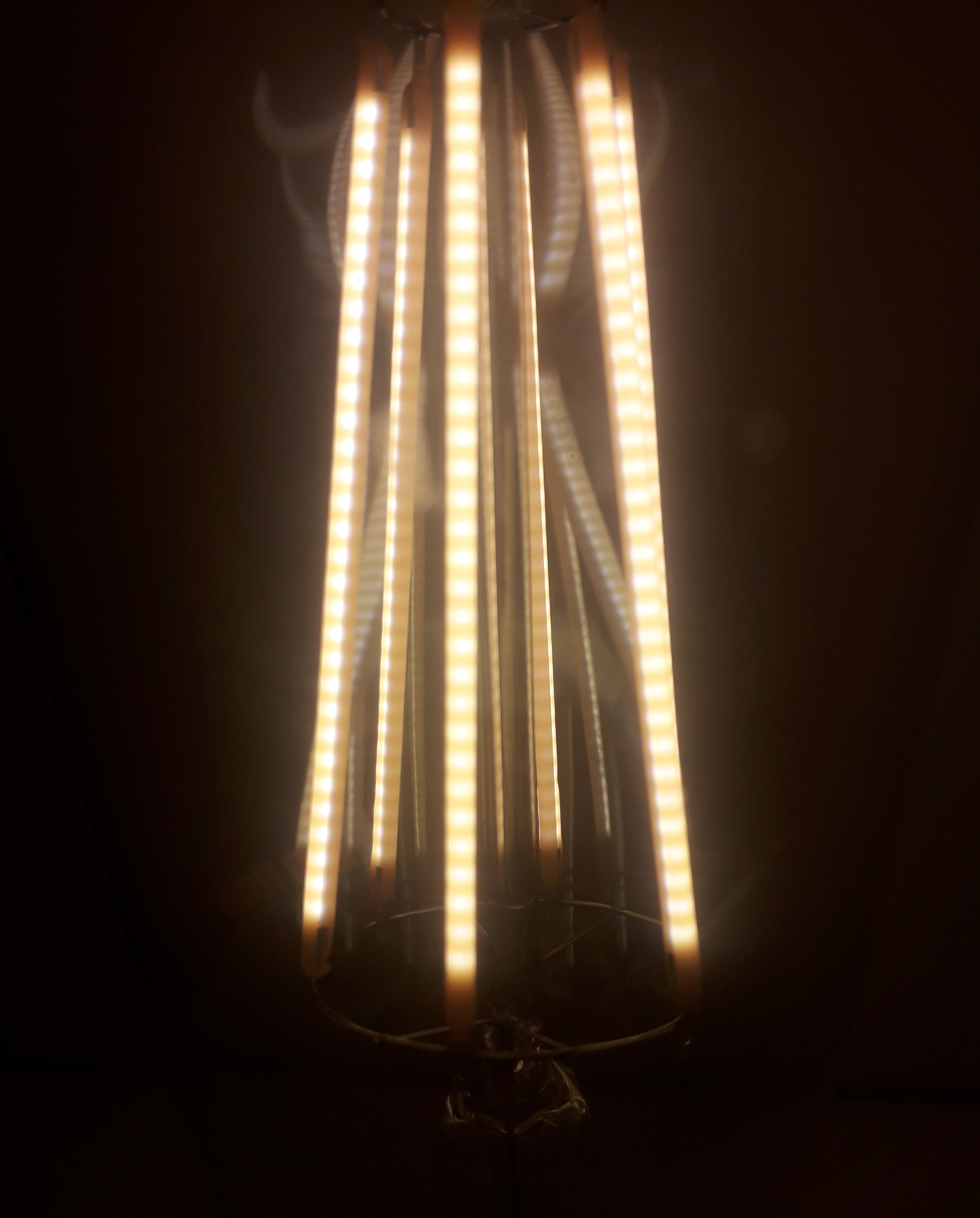 Moduł LED podczas świecenia - w zblizeniu widoczne są iody pokryte luminoforem.